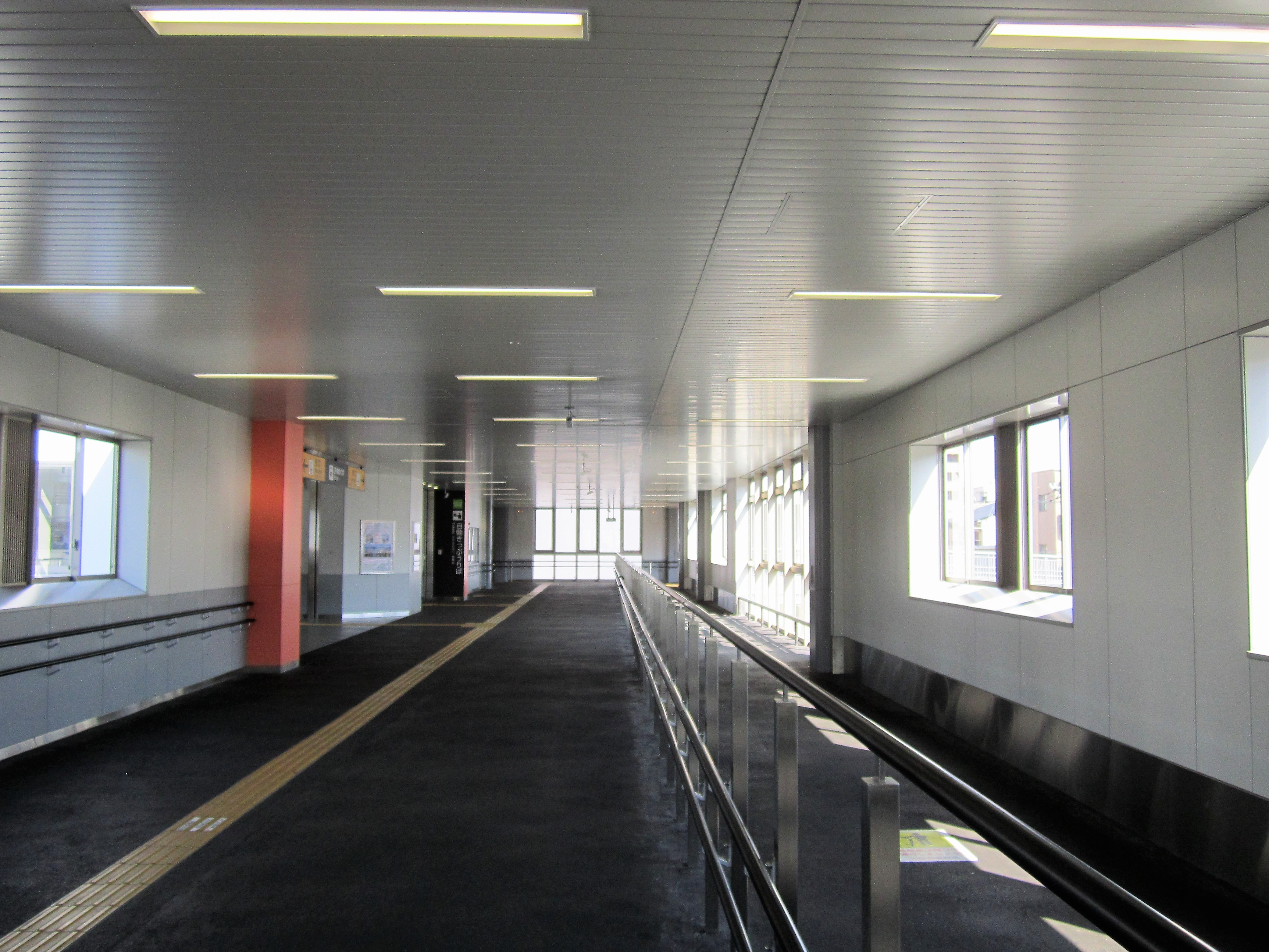 橋上化後の東淀川駅（自由通路）